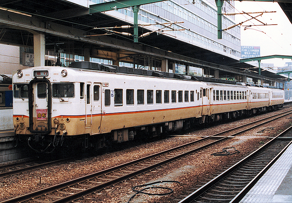 JR九州 急行 「由布」キハ58 674 JR九州急行色